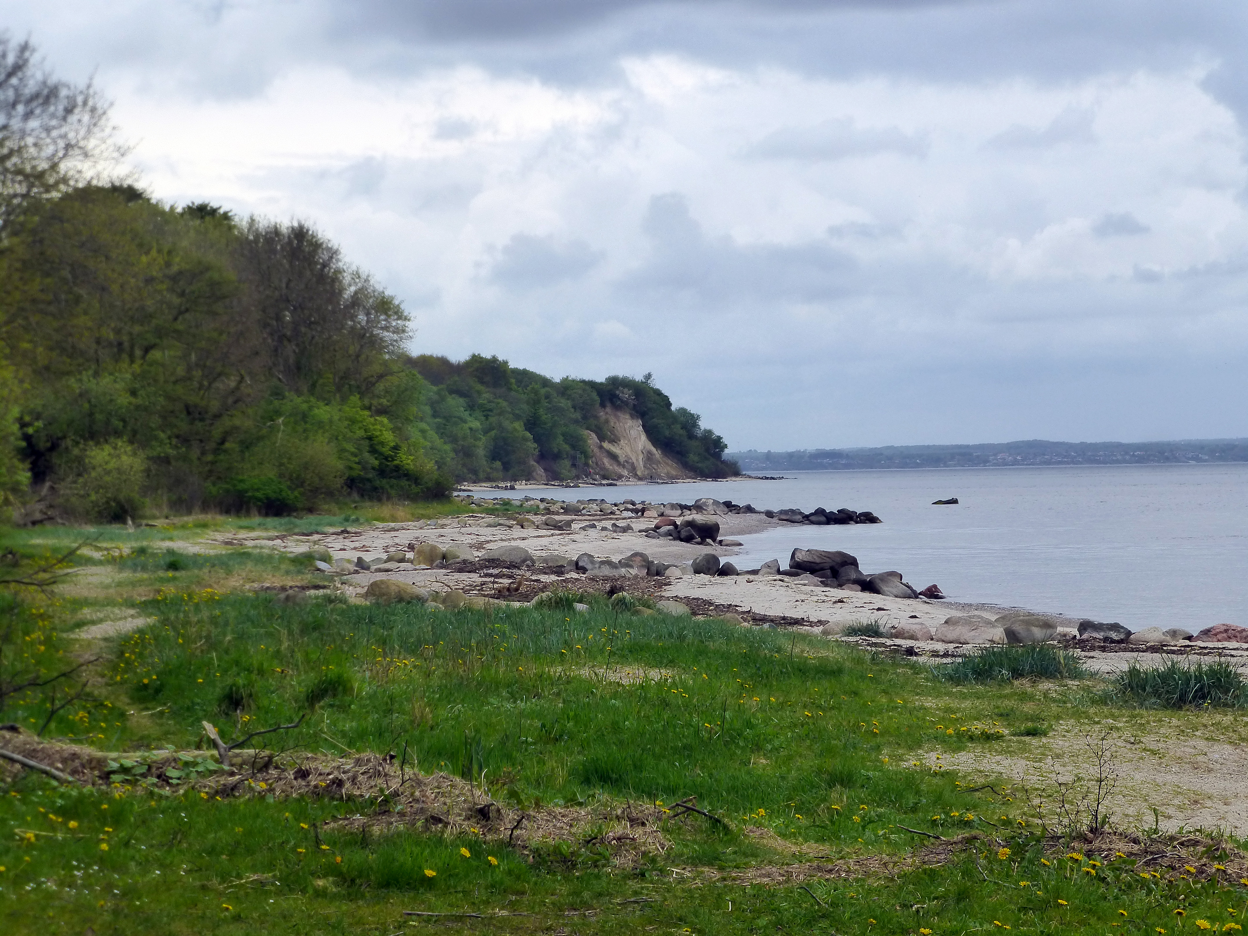 Trelde Klint på nordsiden af Trelde Næs, set fra øst